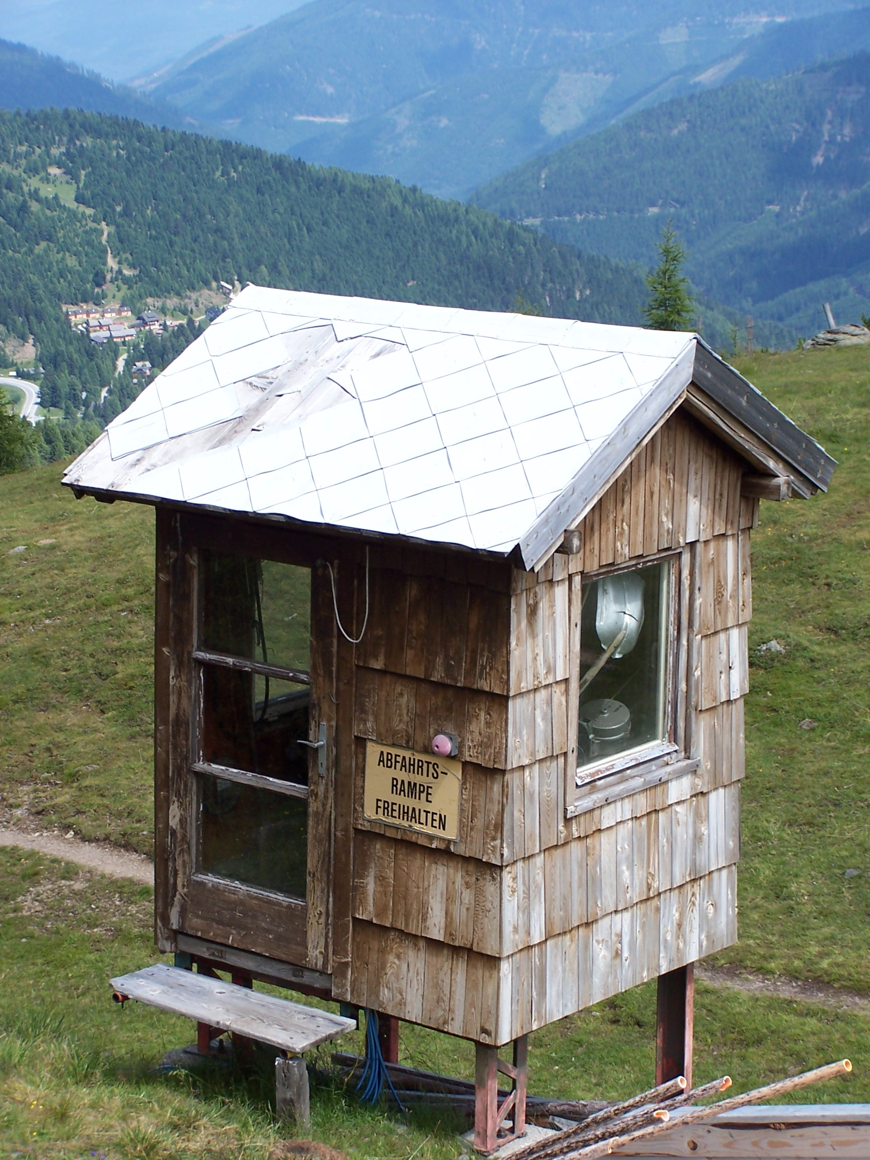 Liftwärterhäuschen an einem Schlepplift (Turracher Alpe?)